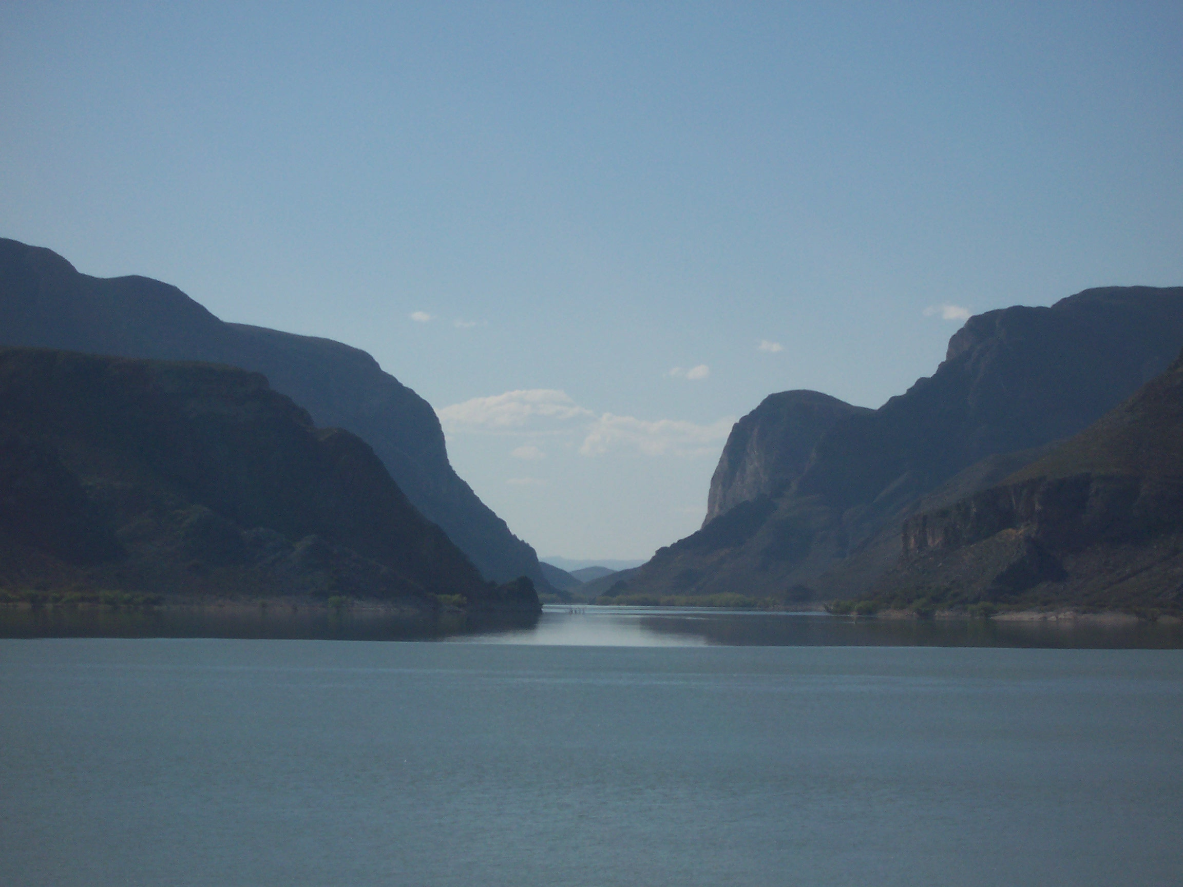 La presa Francisco Zarco, que recoje las aguas del rio Nazas